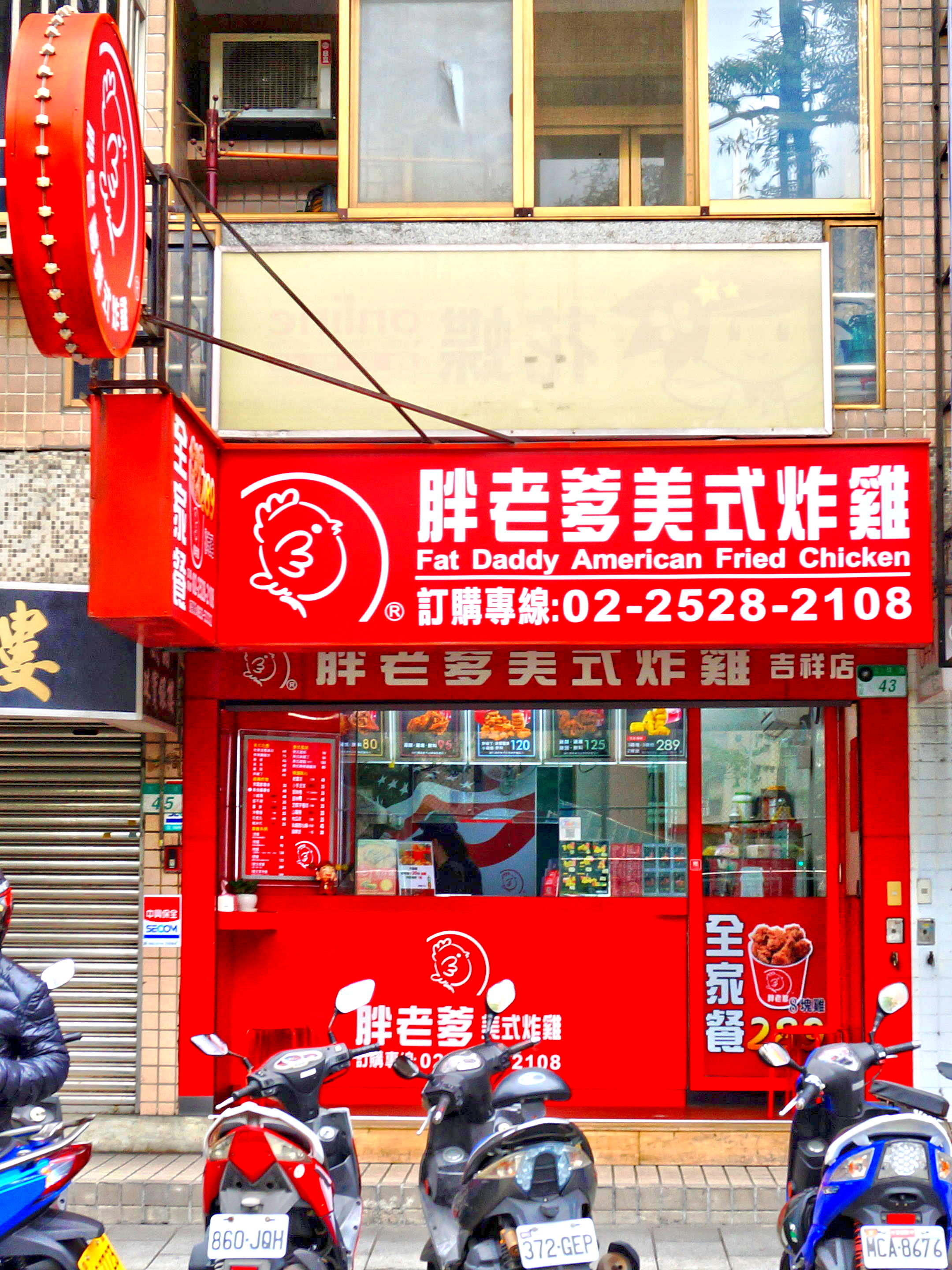 胖老爹美式炸雞吉祥店，地址：臺北市松山區吉祥路43號1樓。